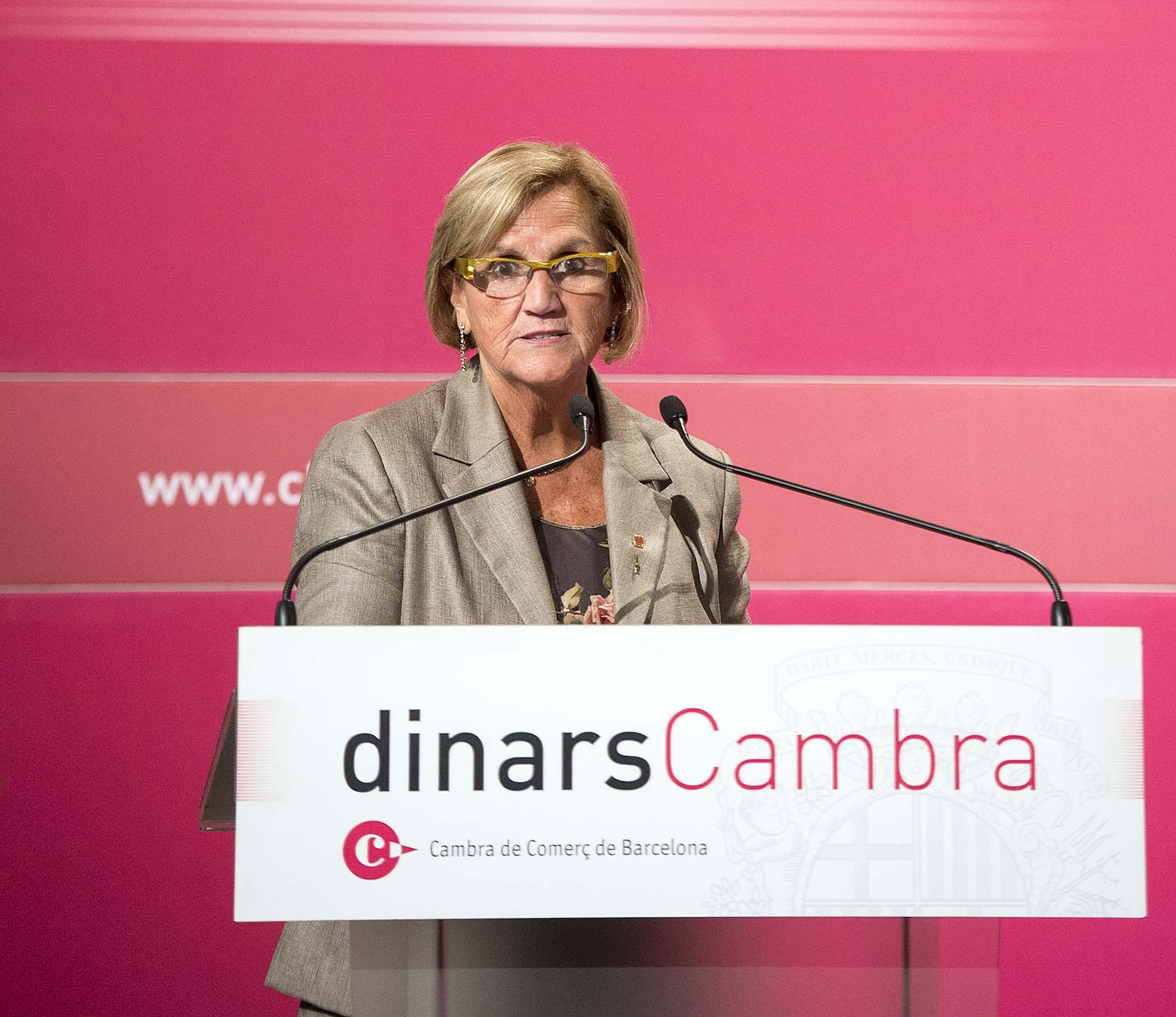 La intervenció de de Gispert als #dinarscambra